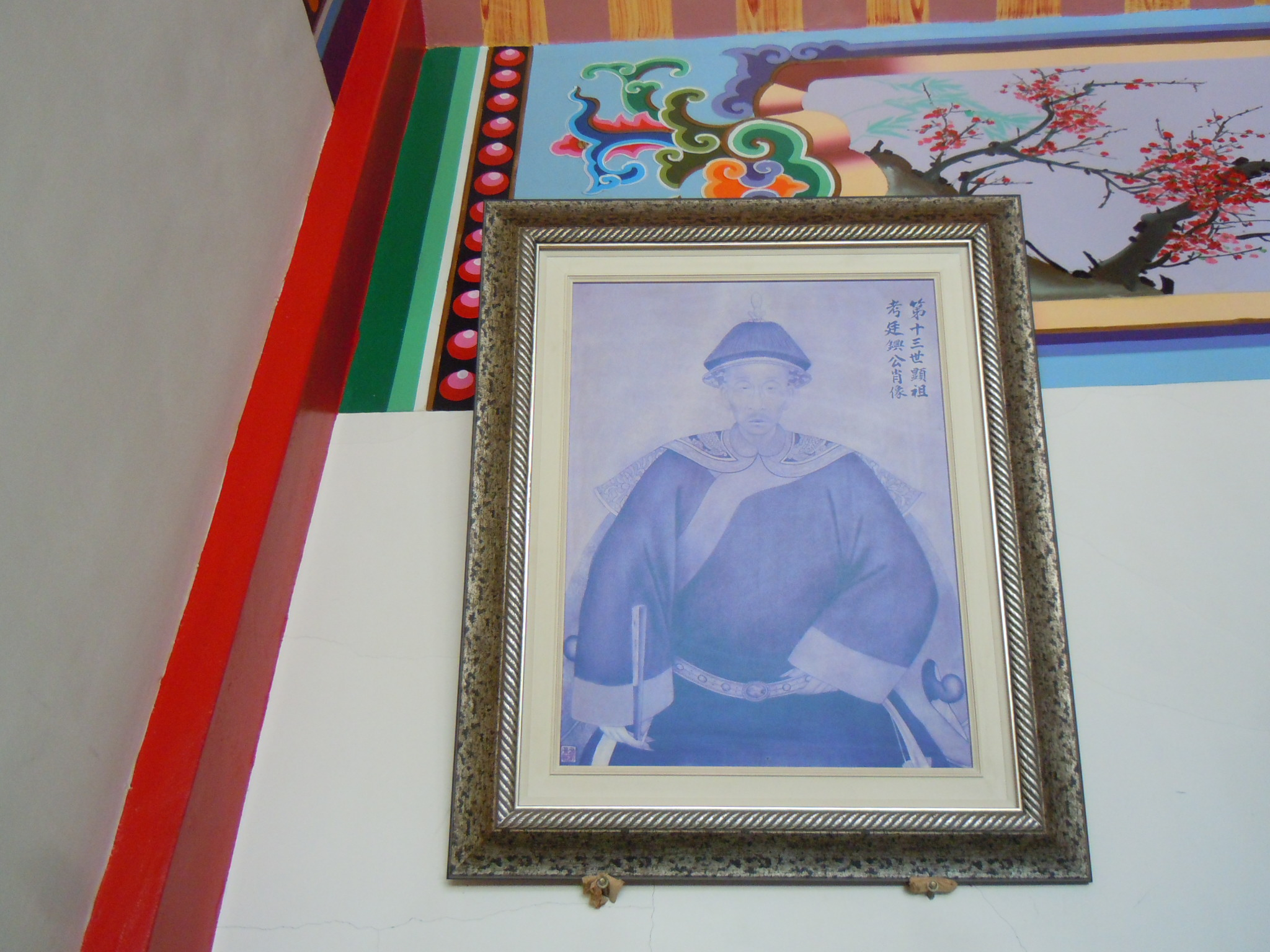 中文（台灣）: 清武家廟位在臺中市西屯區港尾里清武巷1號。